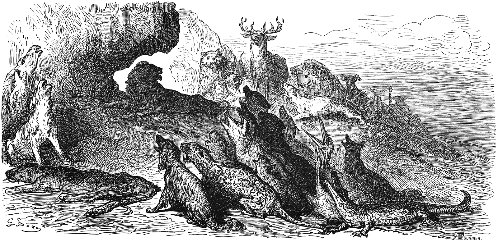 grafika z książki PL Bajki, Jean de La Fontaine, nakładem i drukiem Jana Noskowskiego, Warszawa 1876